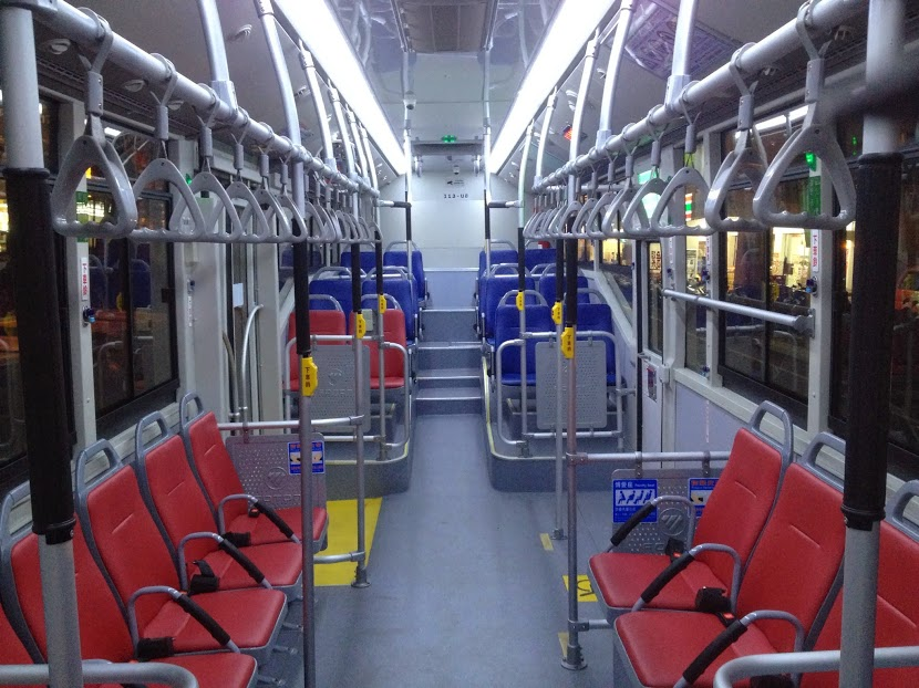 台中客運 2013〈2013〉 FOTON BJ6123 內裝